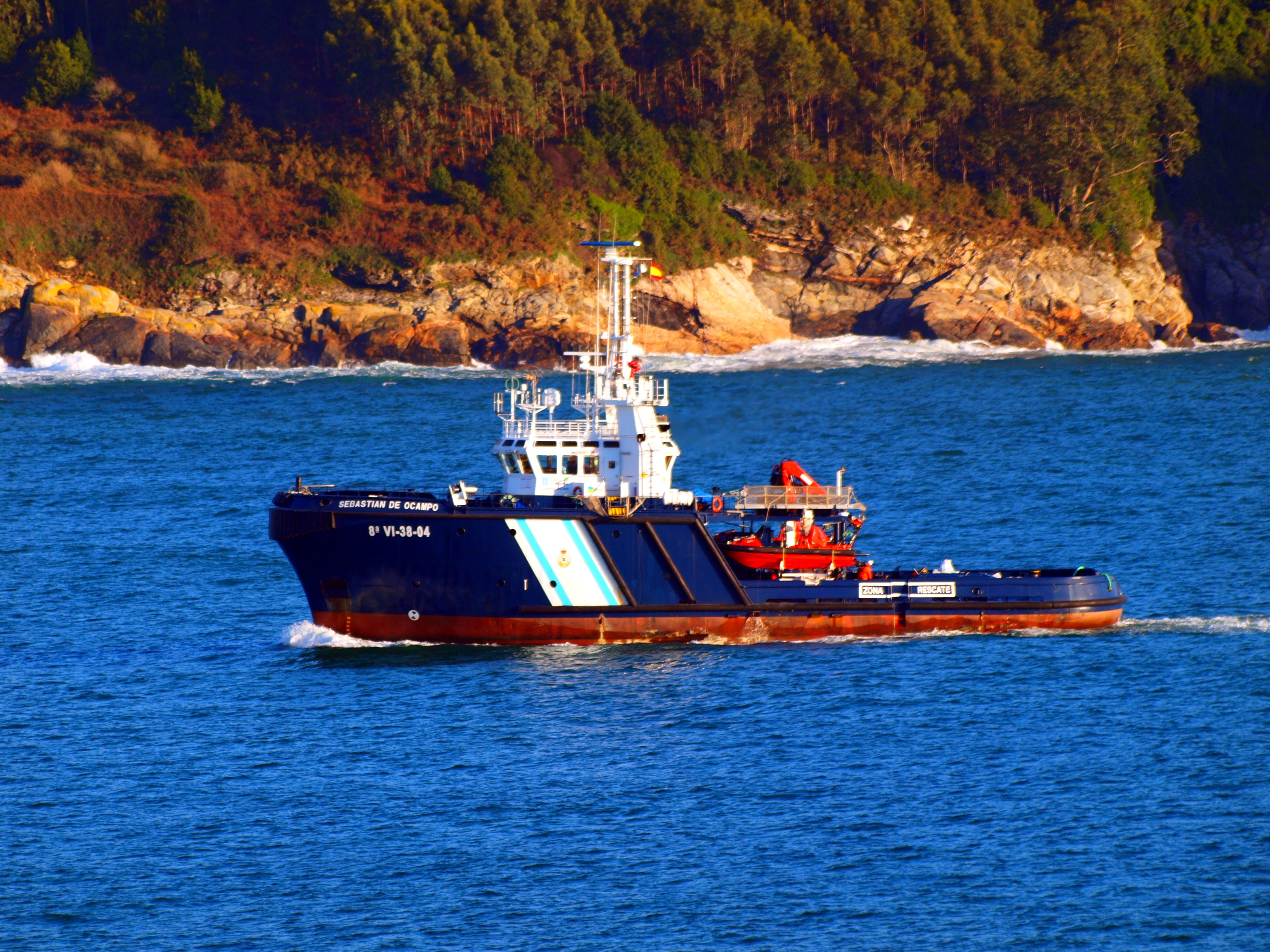 Buque remolcador Sebastián de Ocampo, (IMO: 9329021; MMSI: 224111000) del Servicio de Guardacostas de Galicia, saliendo del Puerto de Celeiro rumbo al már Cantábrico. Foto tomada con Olympus E-450 + Zuiko 70-300.